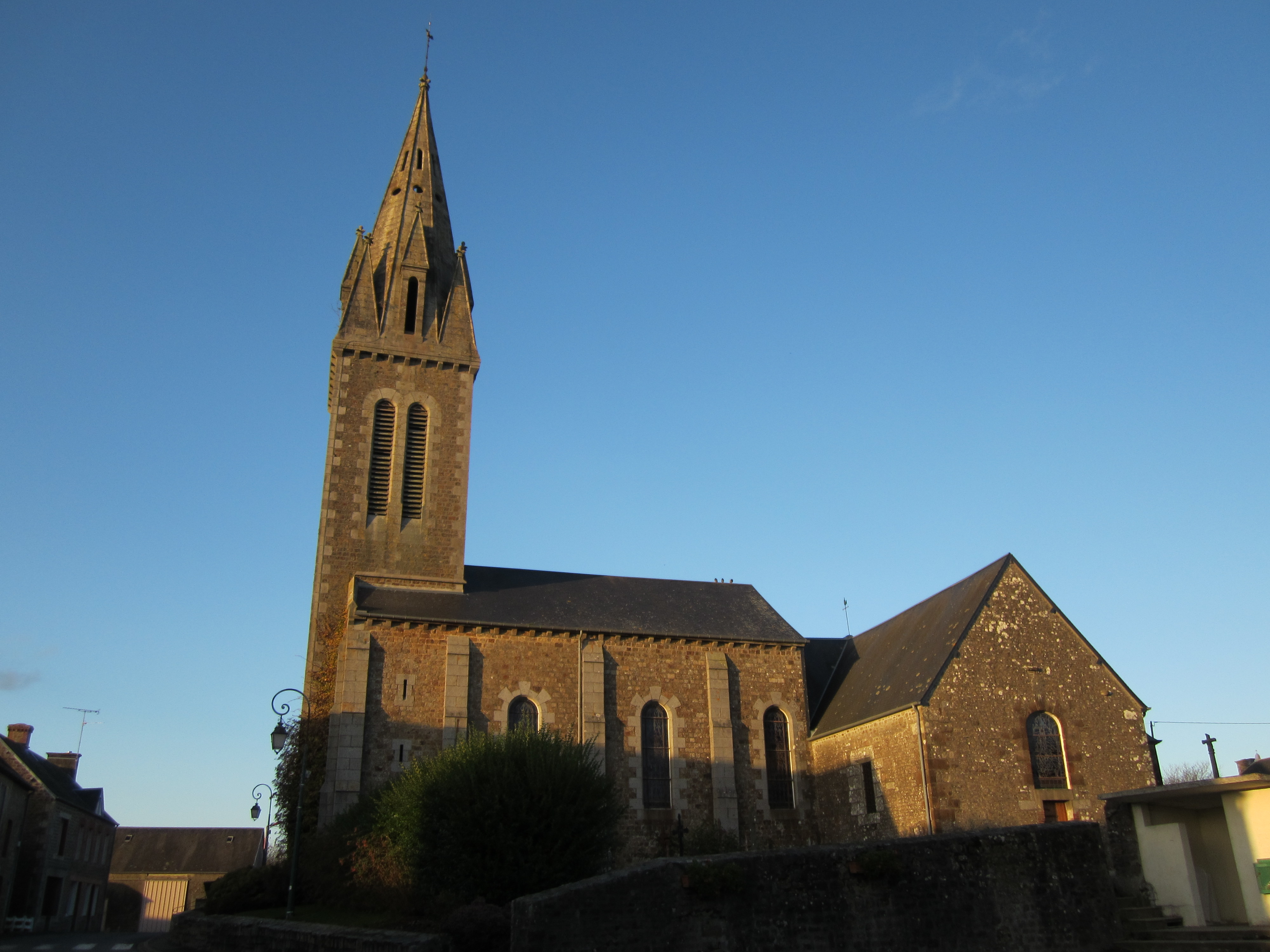 Le Grand-Celland, MAnche